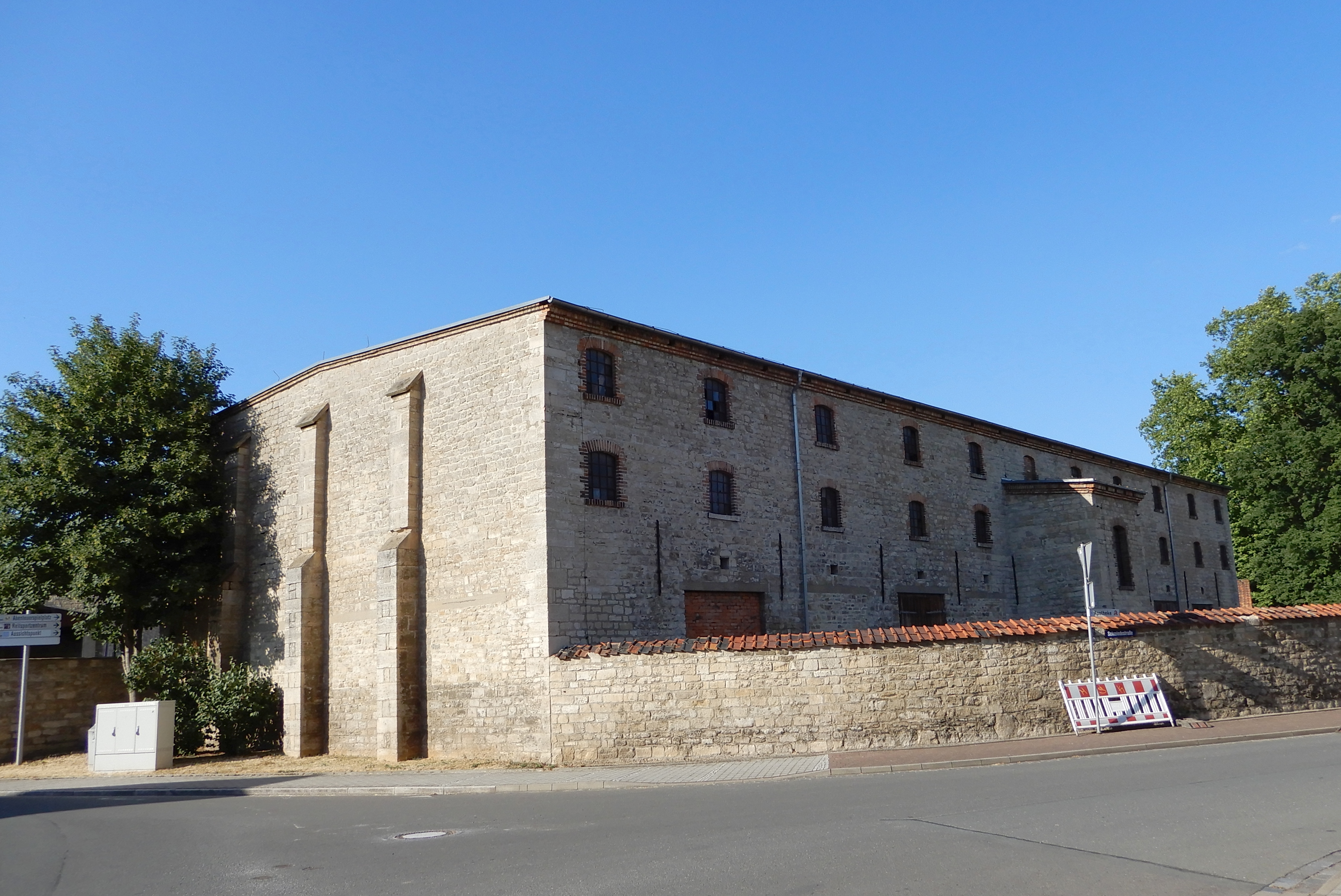 Gatersleben, Gutshof